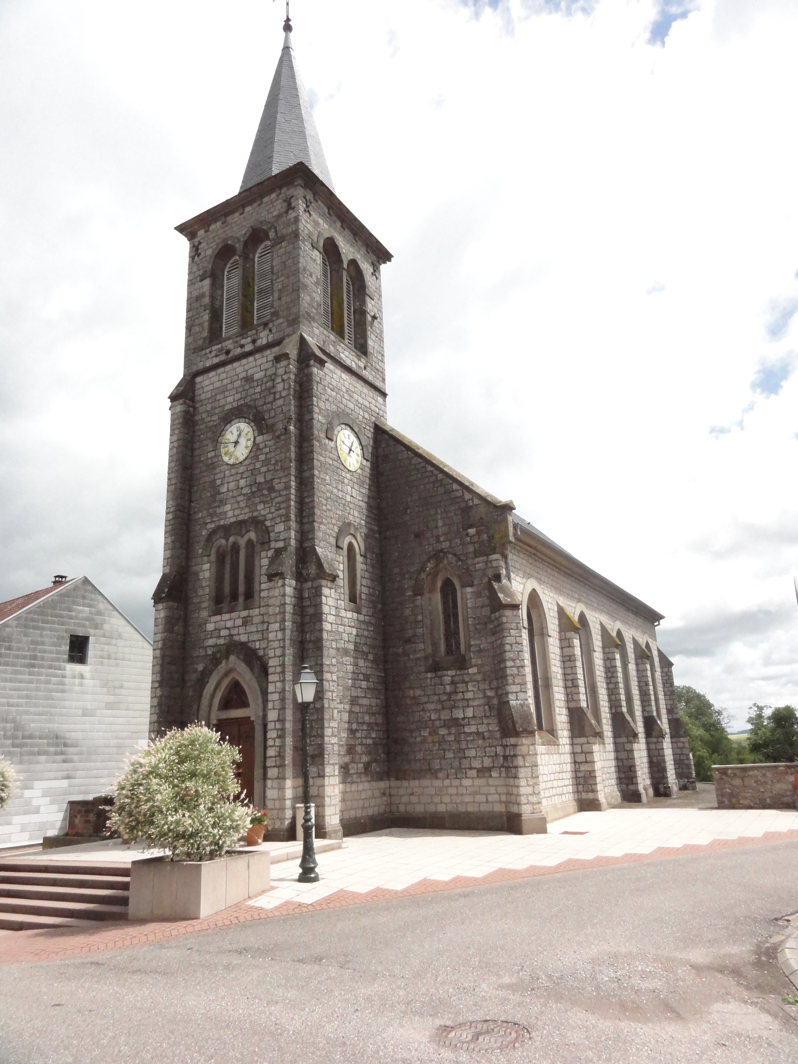 Zilling (Moselle) église